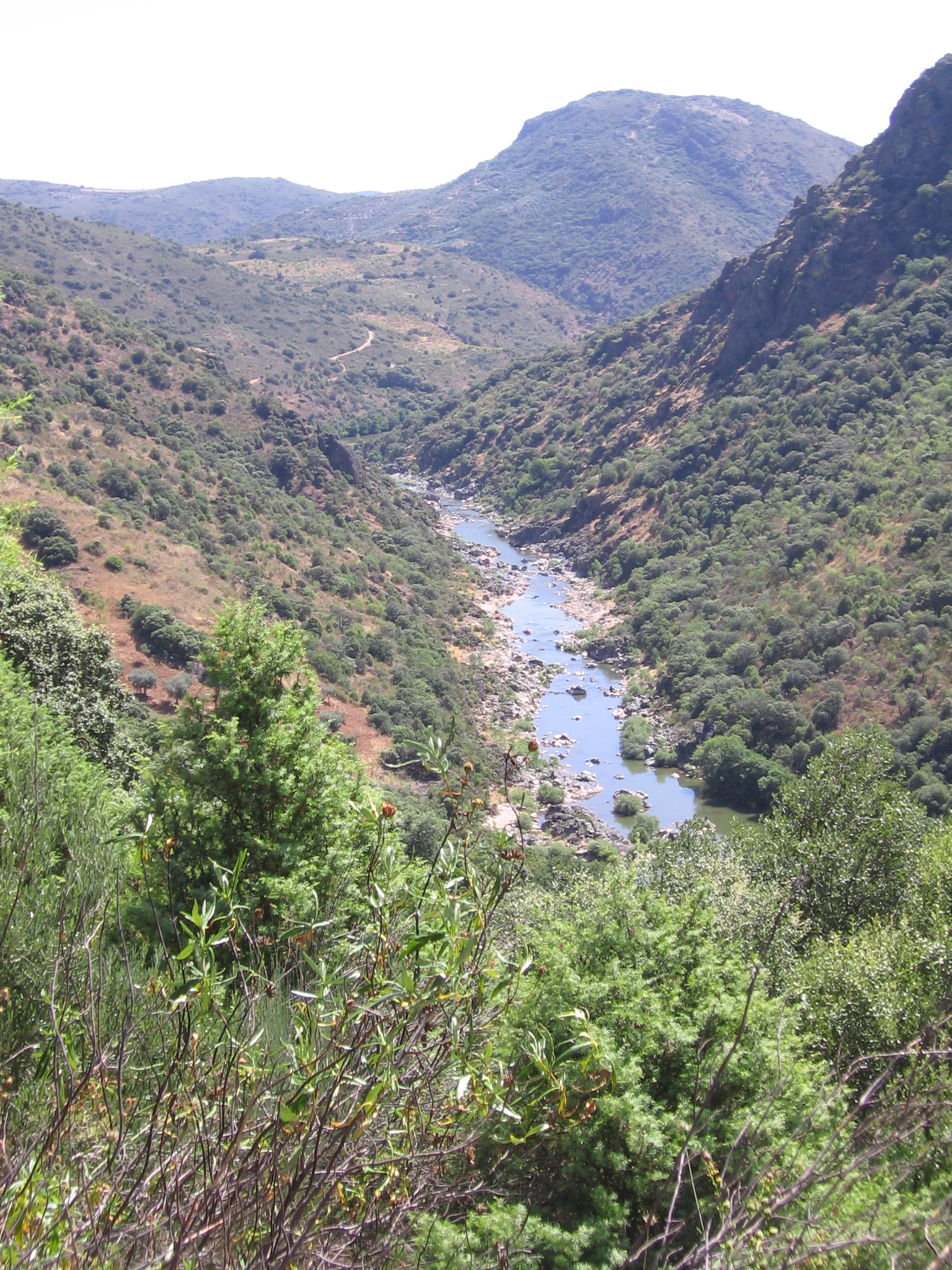 Vista del valle del Río Sabor en su curso medio antes de ser inundado por el embalse "Baixo Sabor"